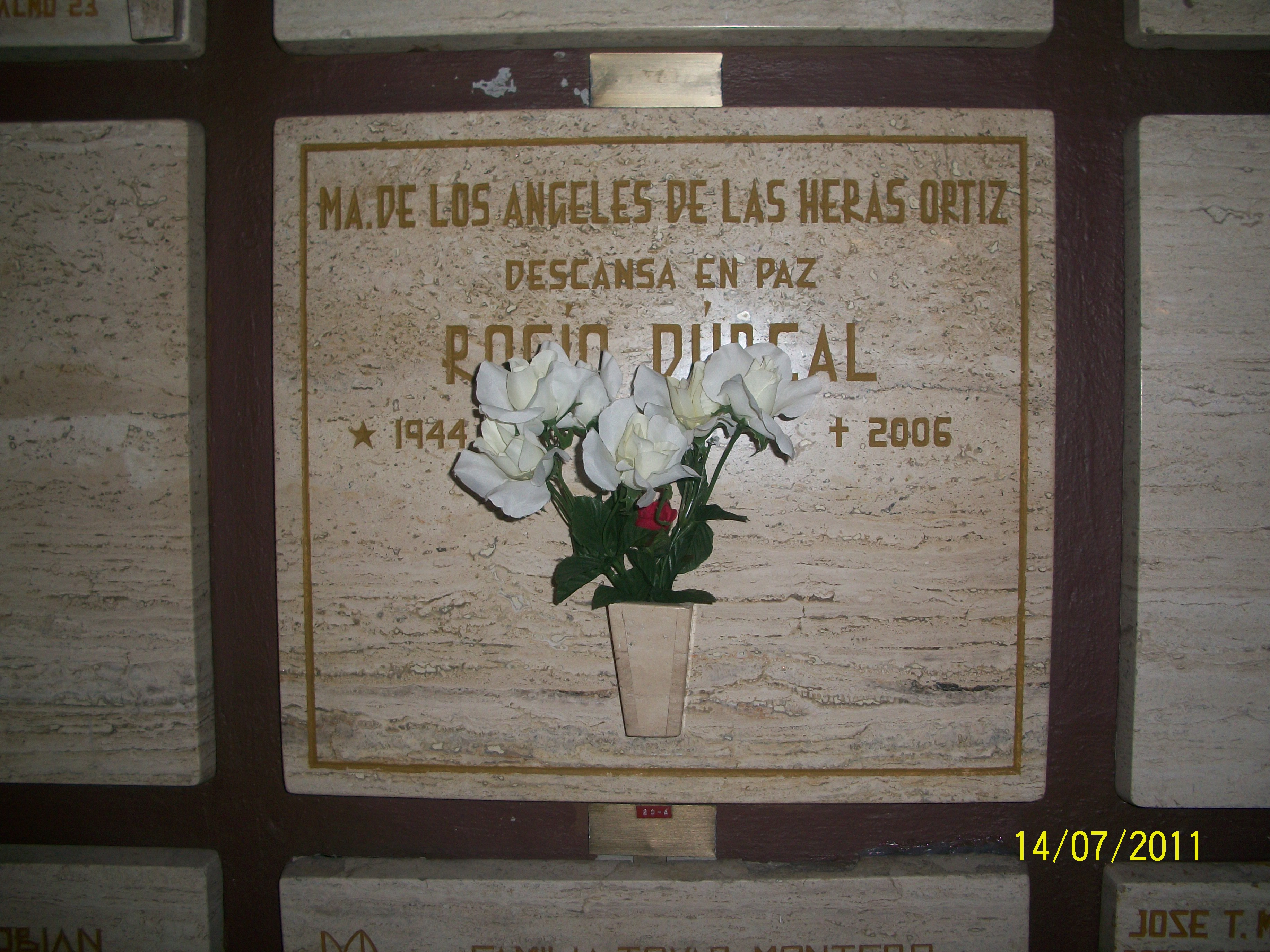 Cripta de Rocío Dúrcal, Basílica de Guadalupe México, D.F.